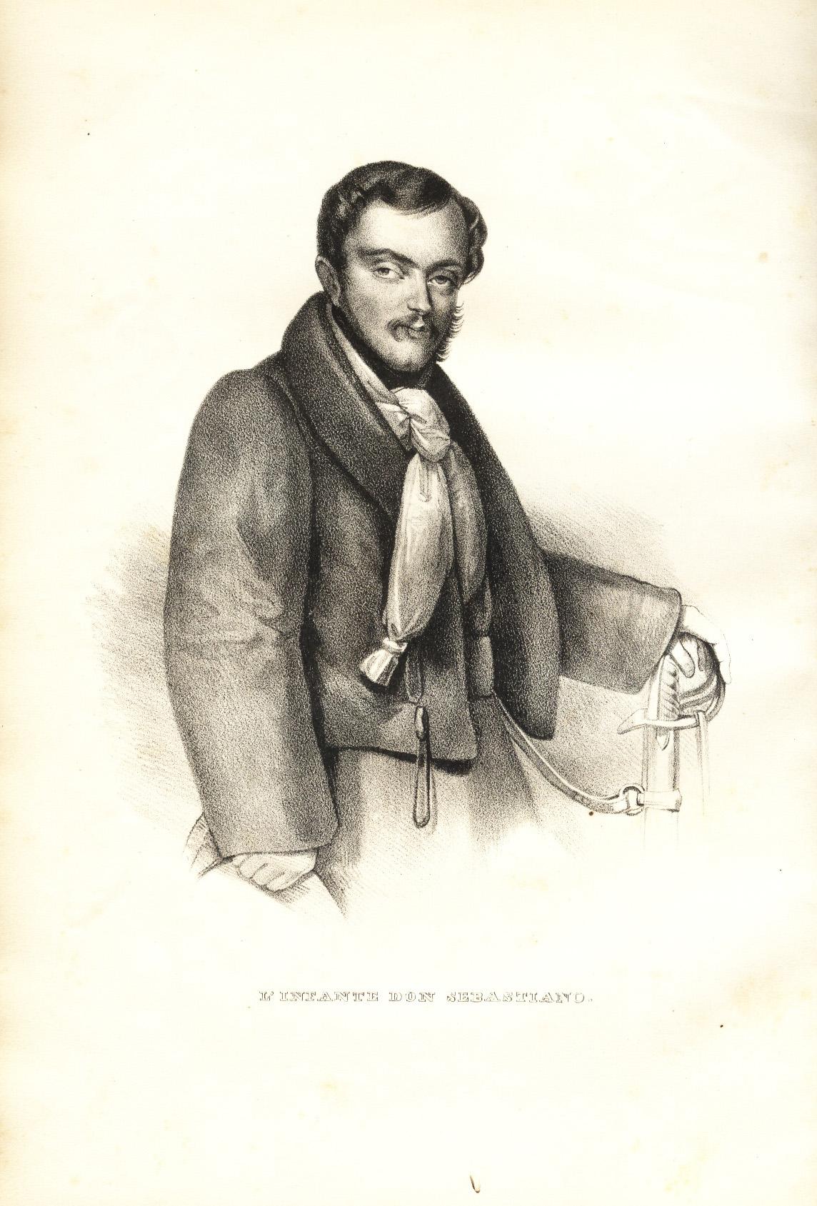 Infante Sebastián. Dibujo de Isidoro Magués. "Don Carlos e i suoi difensori". Firenze 1837